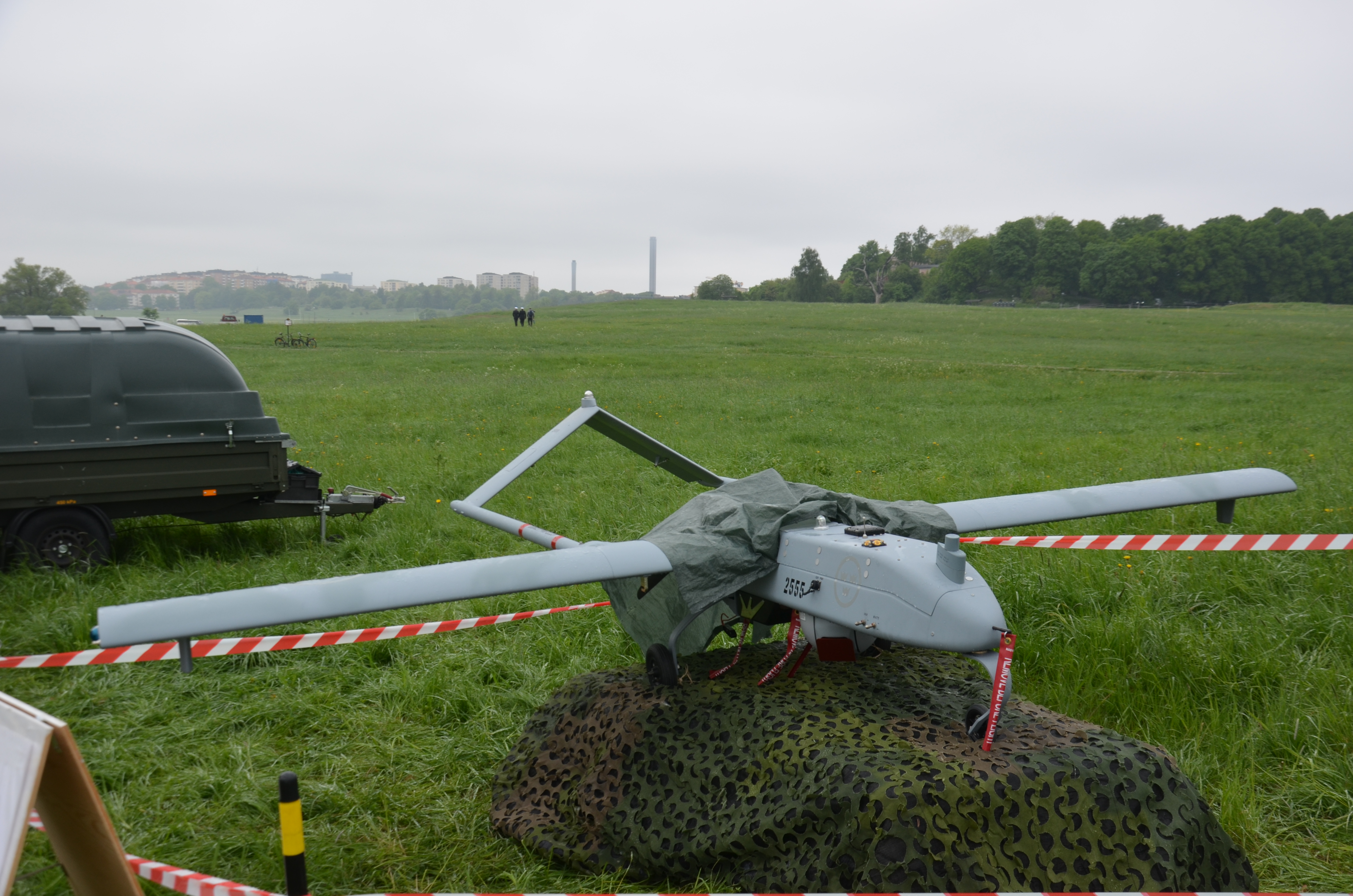 Swedish Army Tactical UAV, UAV 03 Örnen (AAI Shadow 200)